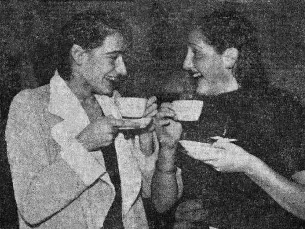 Cor Kint en Irene van Feggelen. Original caption: "Cor Kint (links) en Irene van Feggelen nuttigen lachend een kopje koffie, nadat het wereldrecord 200 m. rugslag door Cor Kint was verbeterd."